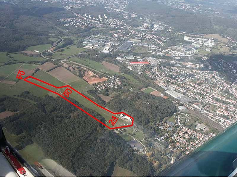 Ansicht Landebahn